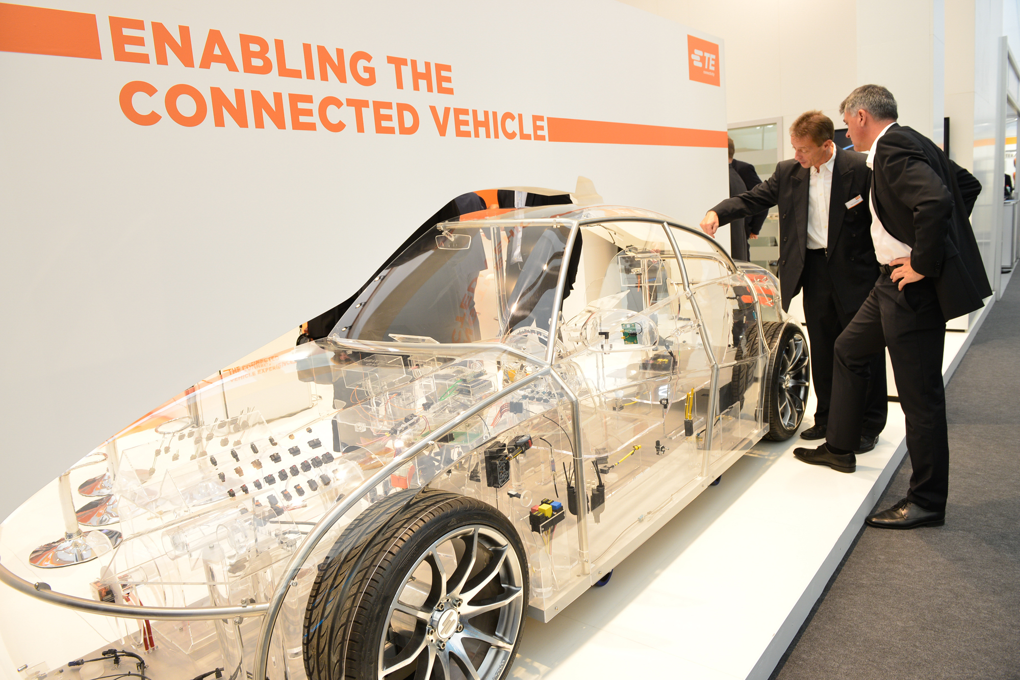 Exponat auf der 10. Internationalen Zuliefererbörse (IZB) in Wolfsburg, 2018